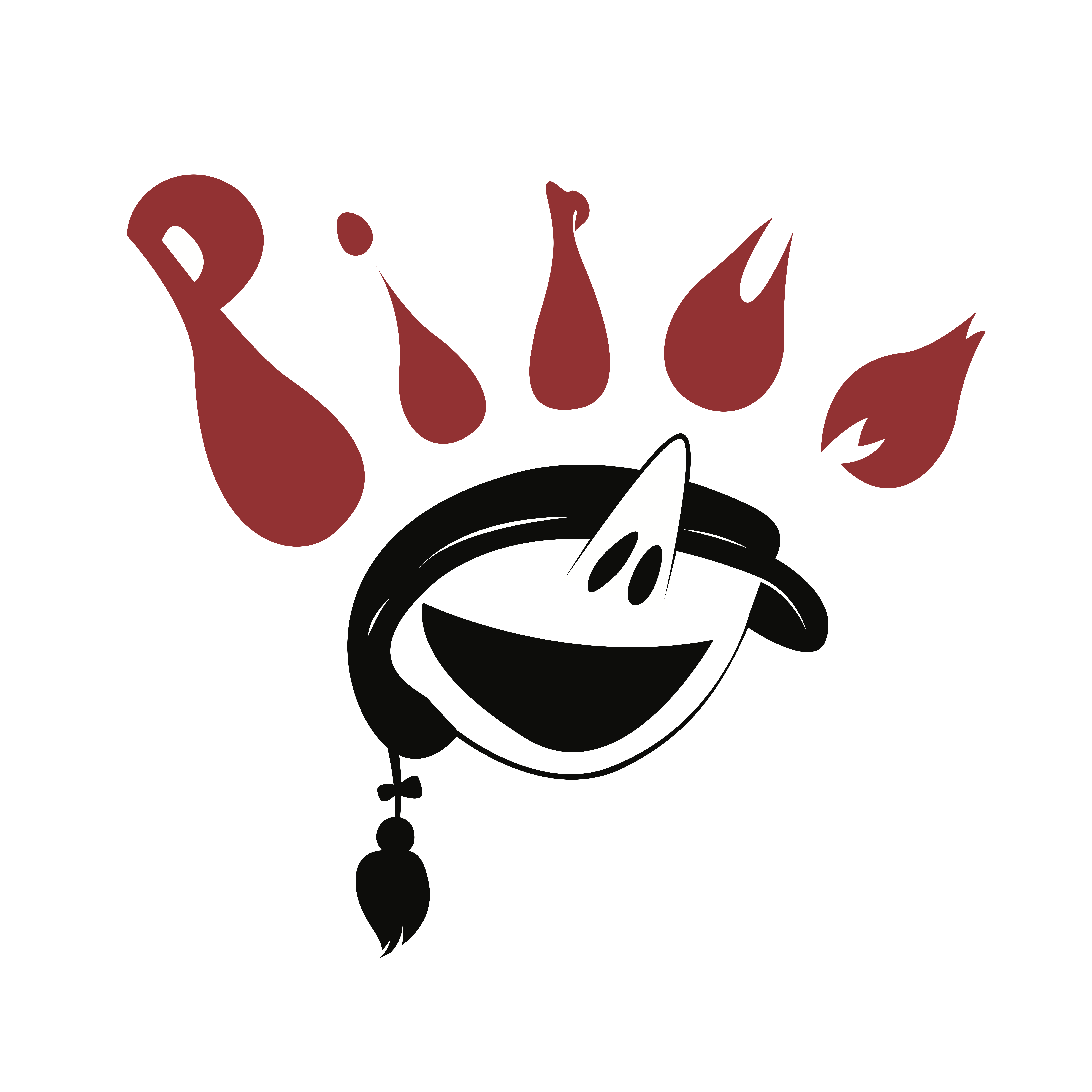 Vektorisert utgave av figuren på Pirums fane